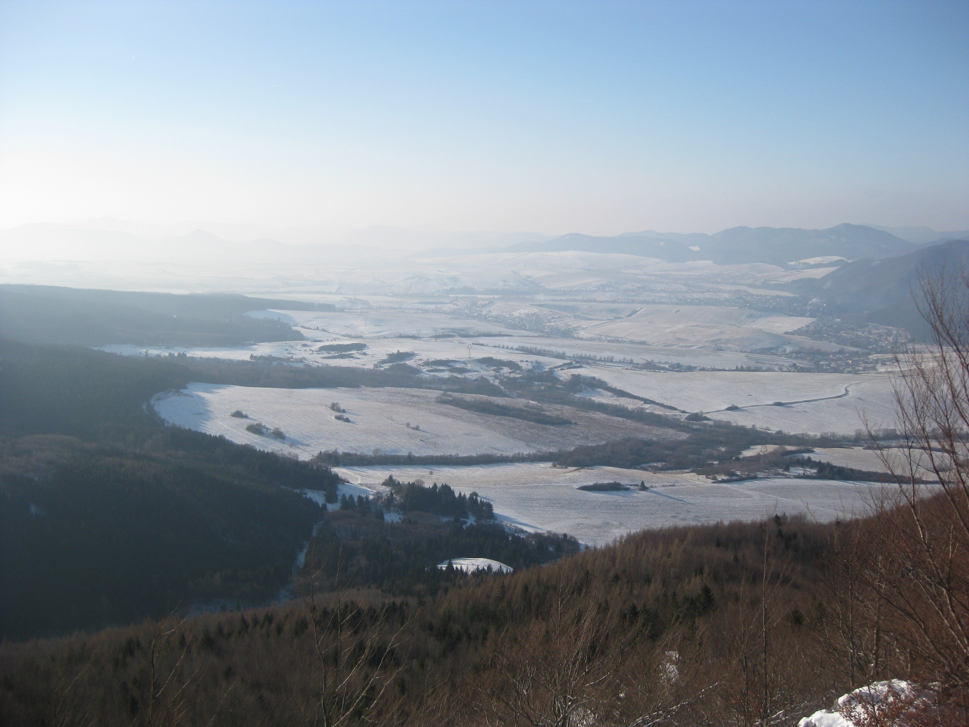 Rajecka dolina z vrchu Kozol